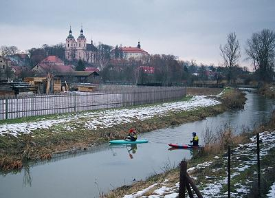 Pohled na řeku Mrlinu a Rožďalovice